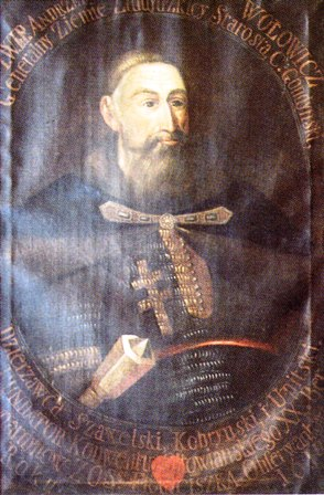 Беларуская (тарашкевіца): Партрэт Андрэя Валовіча (Andrej Vałovič)